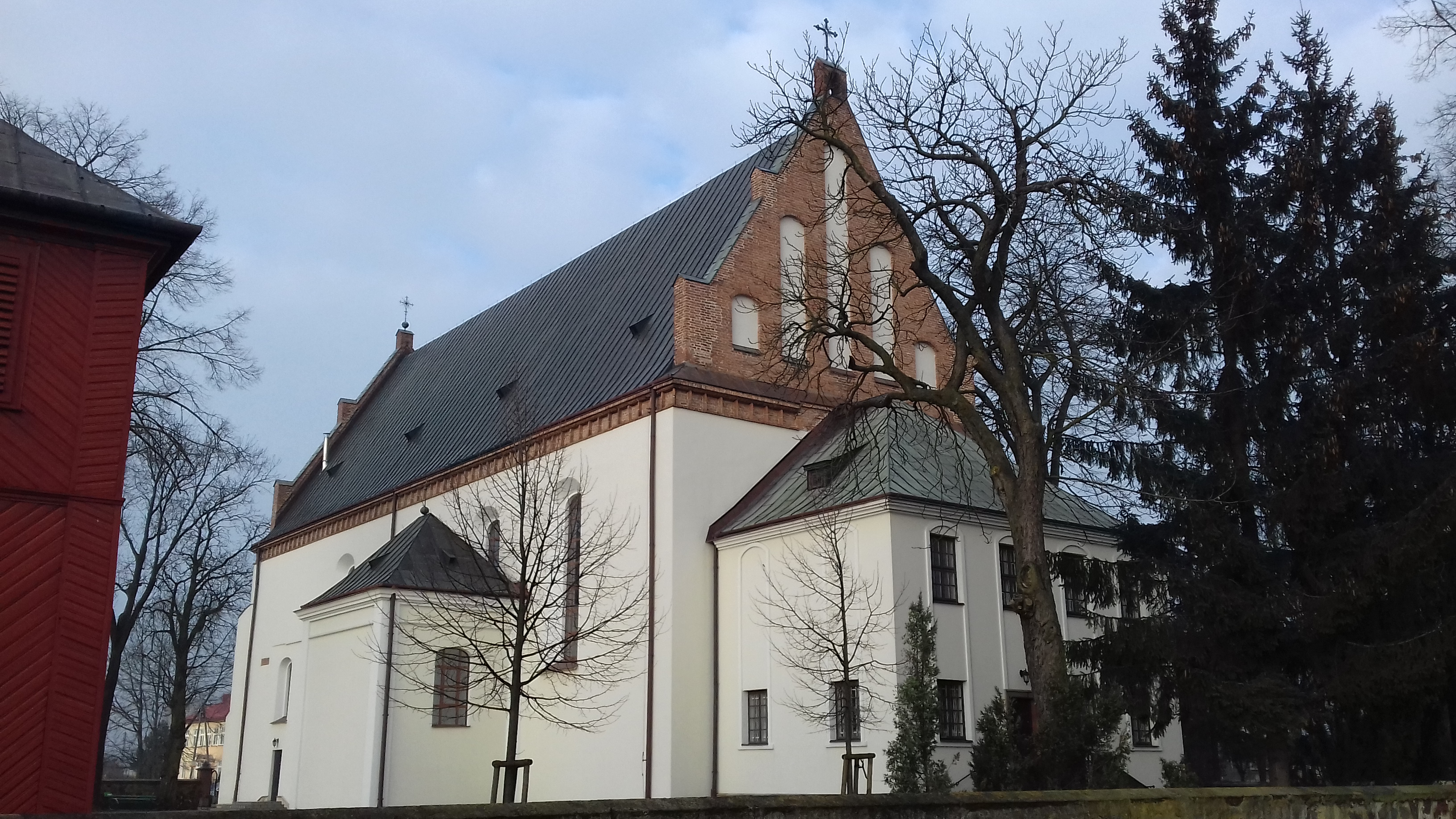 Stanisławów (gm. Stanisławów, pow. Mińsk Mazowiecki) - kościół św. Jana Chrzciciela i św. Stanisława Biskupa i Męczennika